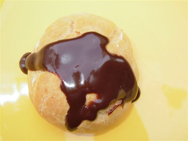 Chou au chocolat, dessert